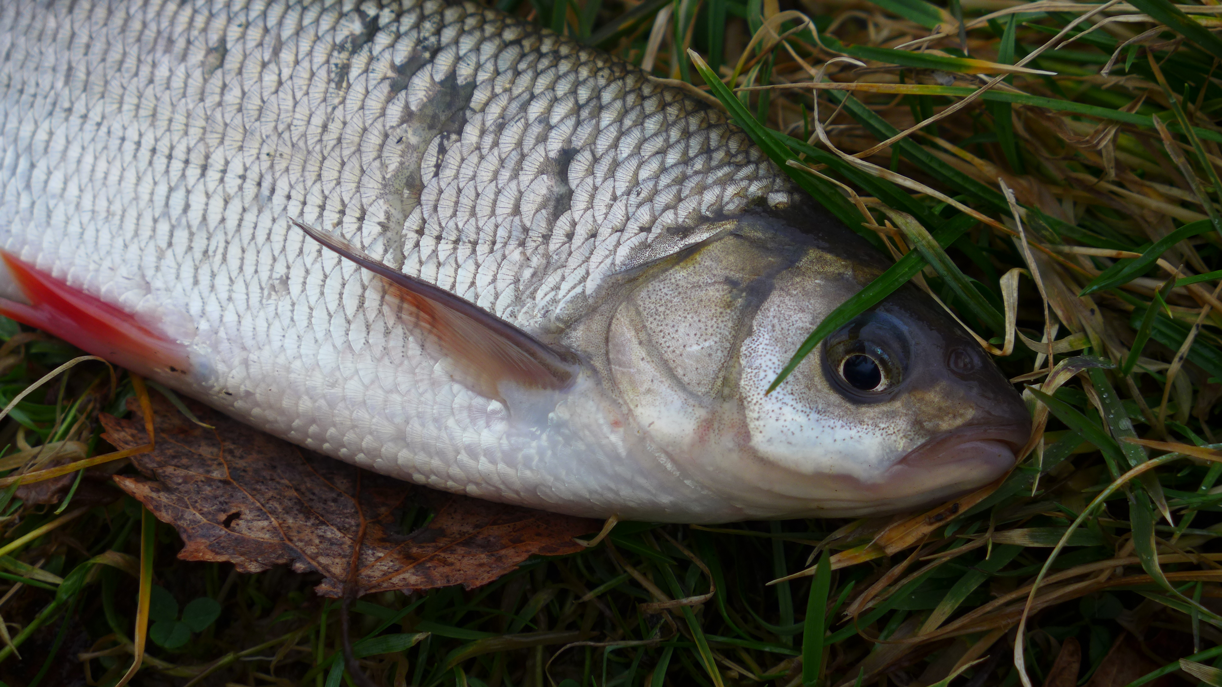 Jaż- ryba karpiowata z widoczną linią naboczną, czerwoną płetwą brzuszą.